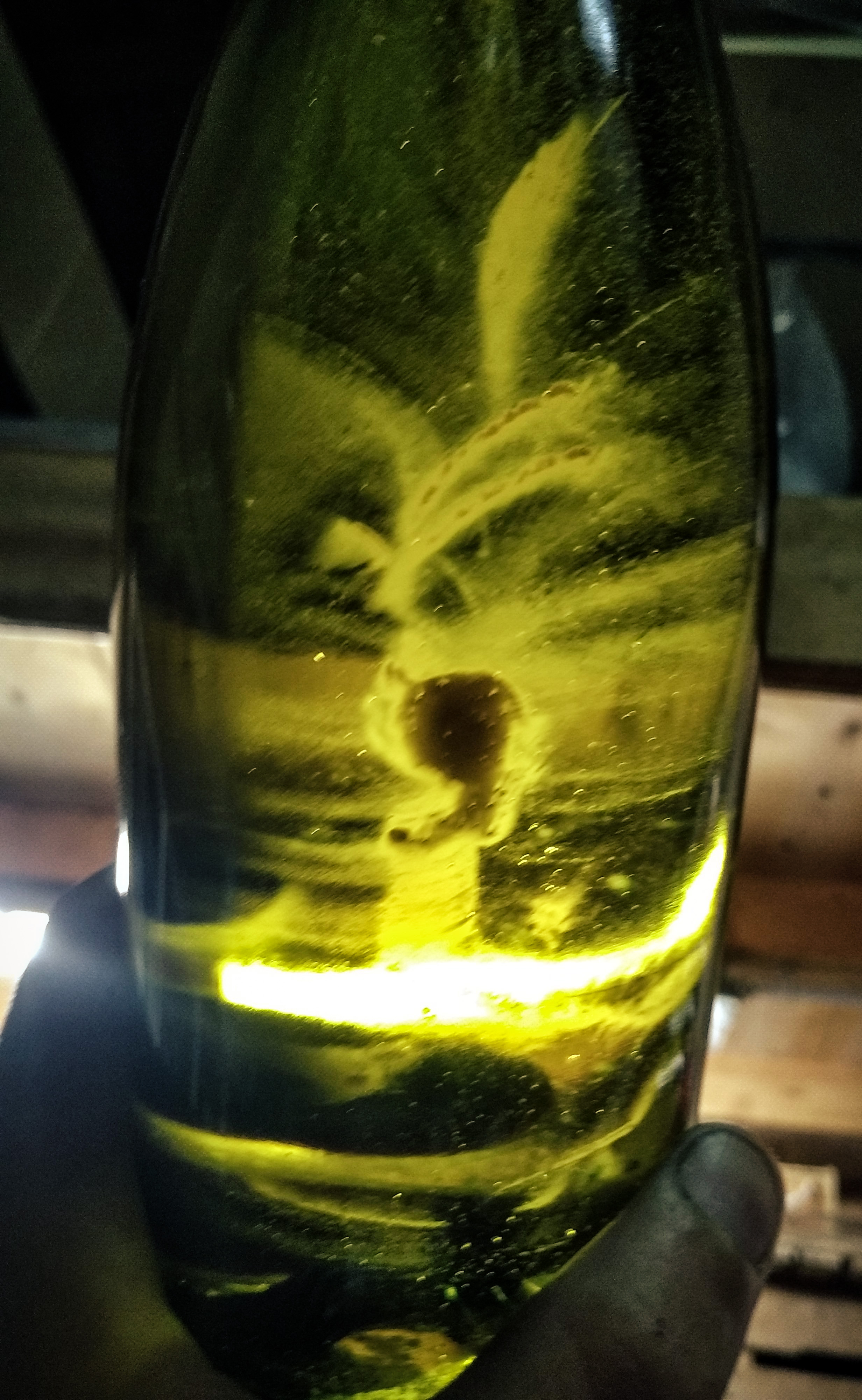 Refermentation d'un vin en bouteille du à des sucres résiduels, dépôt de levure visible.